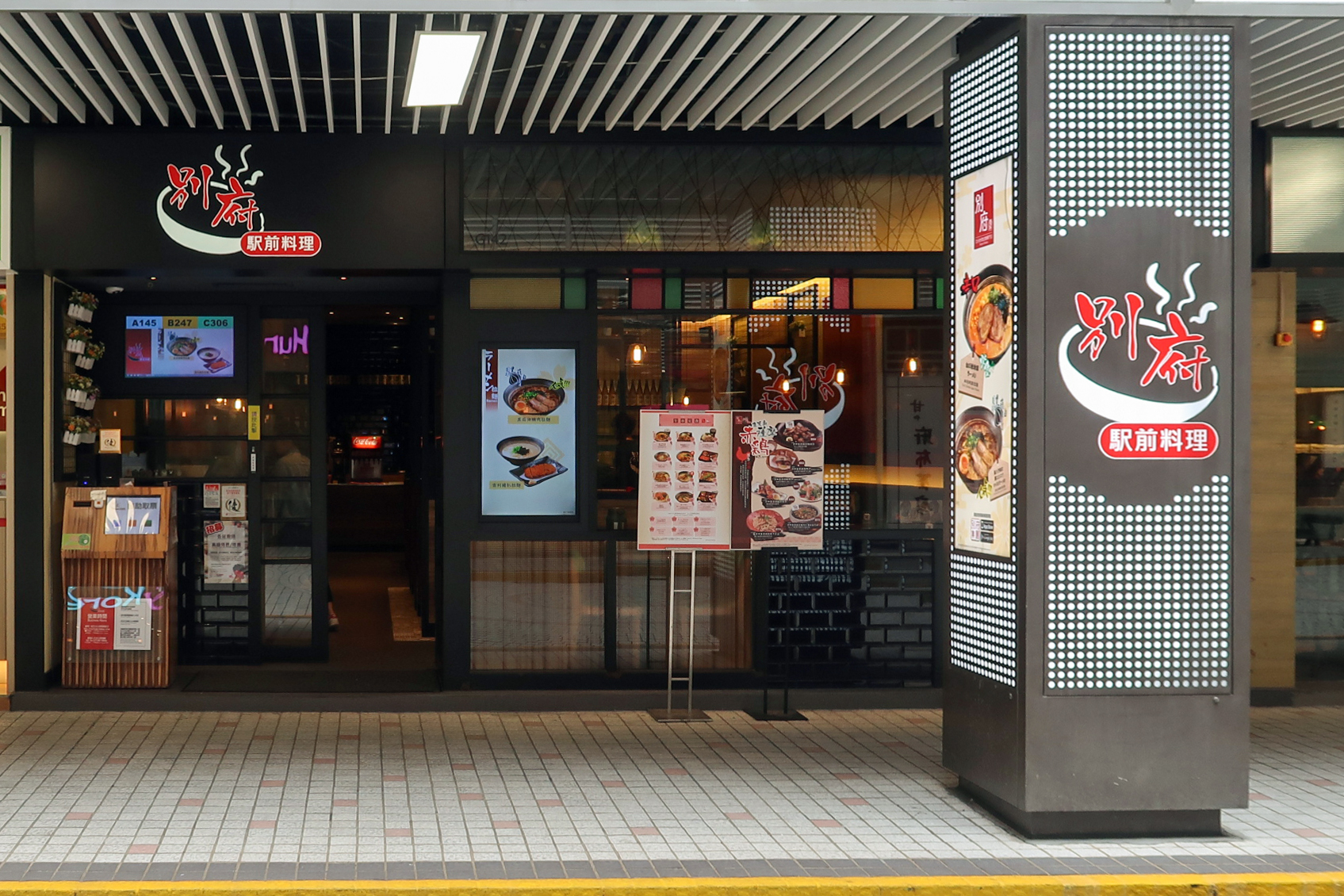 別府駅前料理 Beppu Ekimae